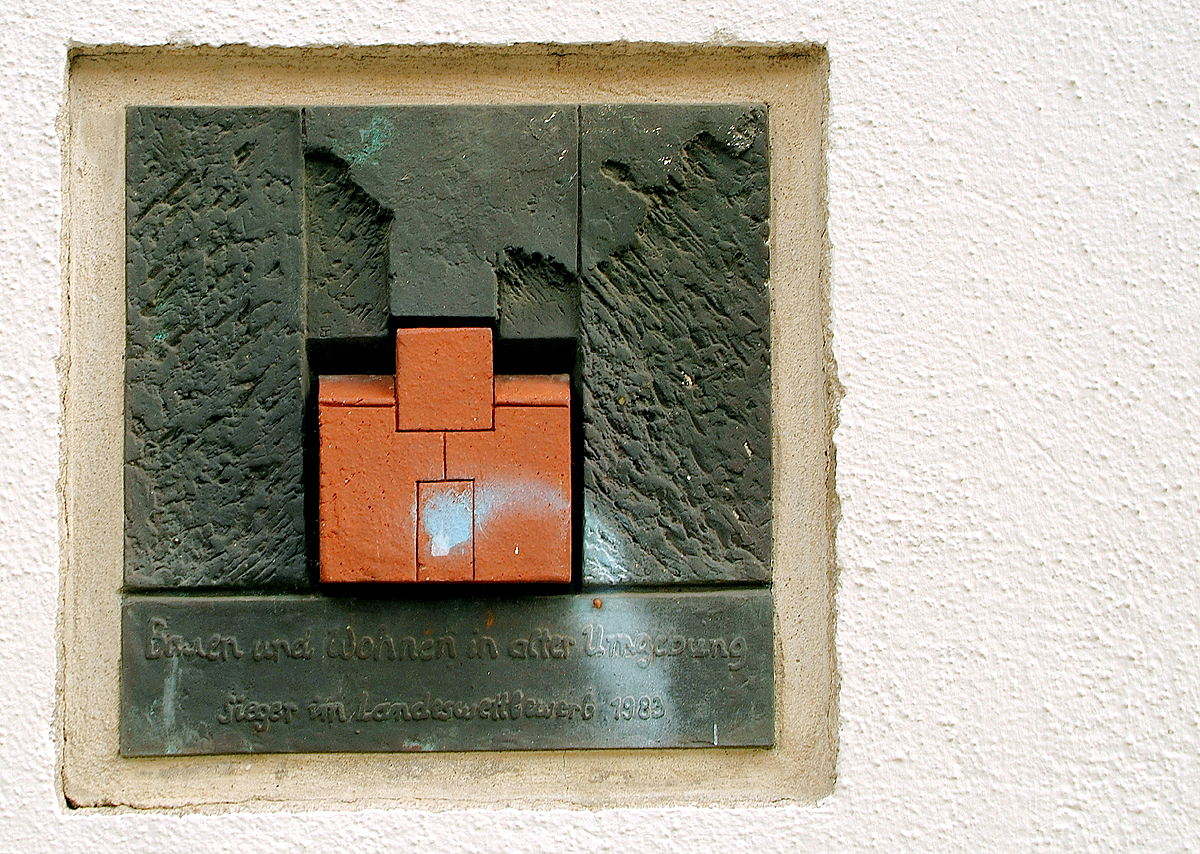 Die Gebäudegruppe Viktoriastraße 23, 24, und 25 in Hannover, Stadtteil Linden-Nord, erhielt die Auszeichnung "Bauen und Wohnen in alter Umgebung, Sieger im Landeswettbewerb 1983". Relief mit Graffiti-Spuren